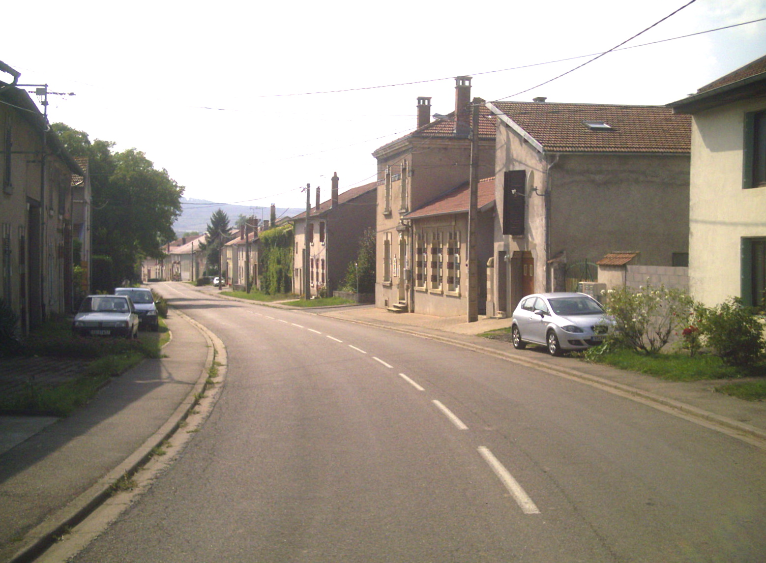 Rue principale